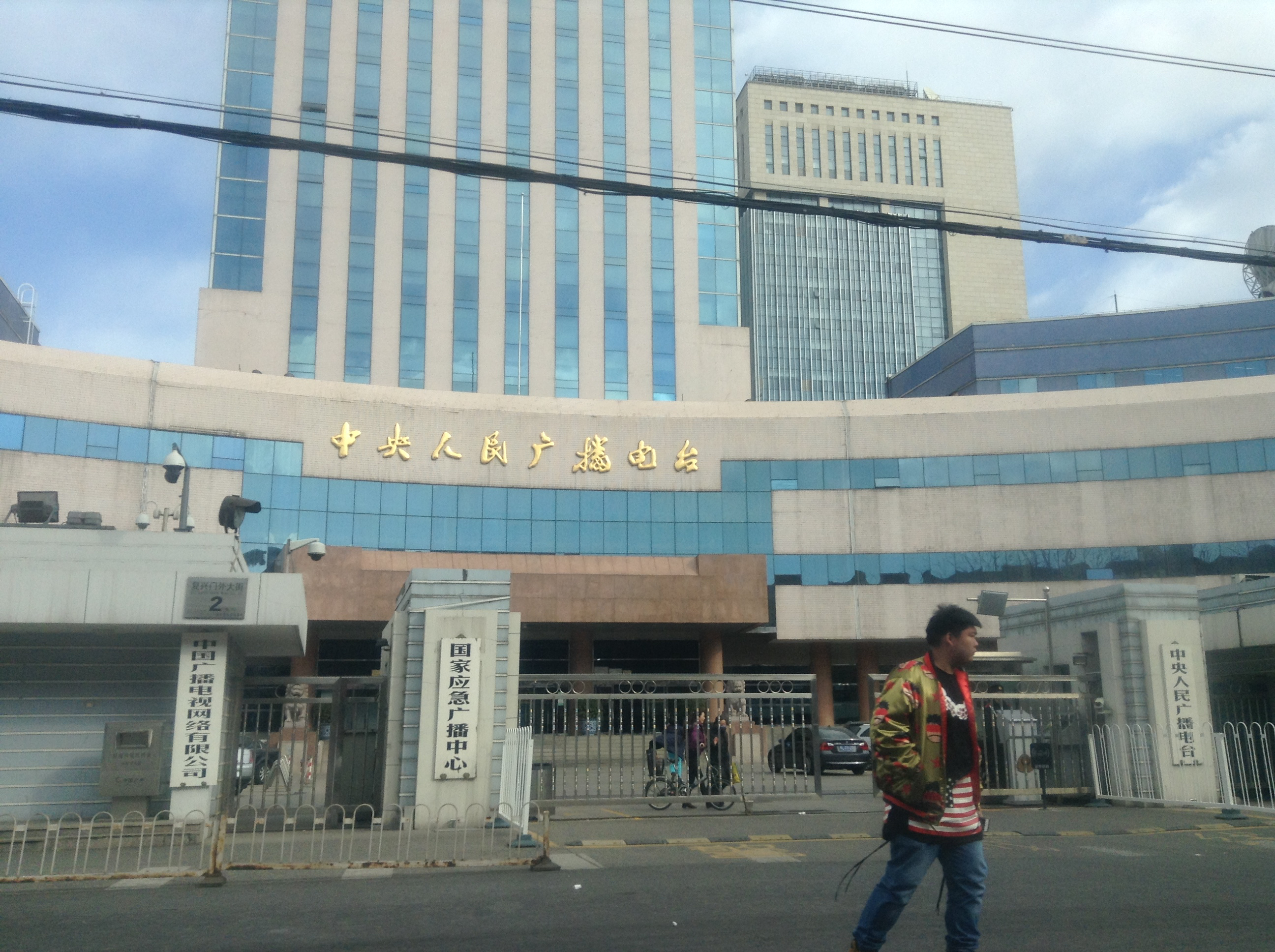 北京廣電總局西門，中央人民廣播電台，國家應急廣播中心